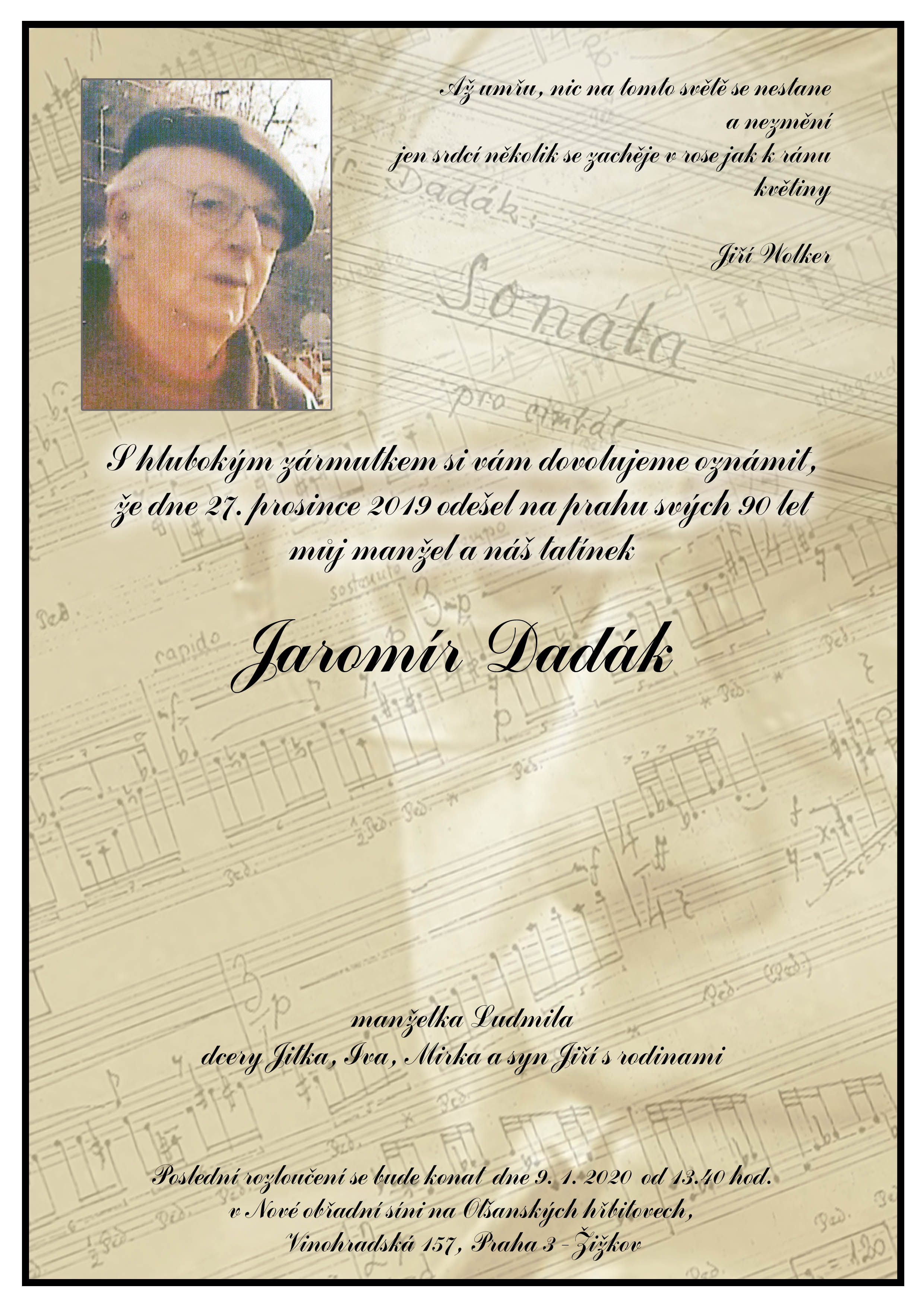 Jaromír Dadák - parte